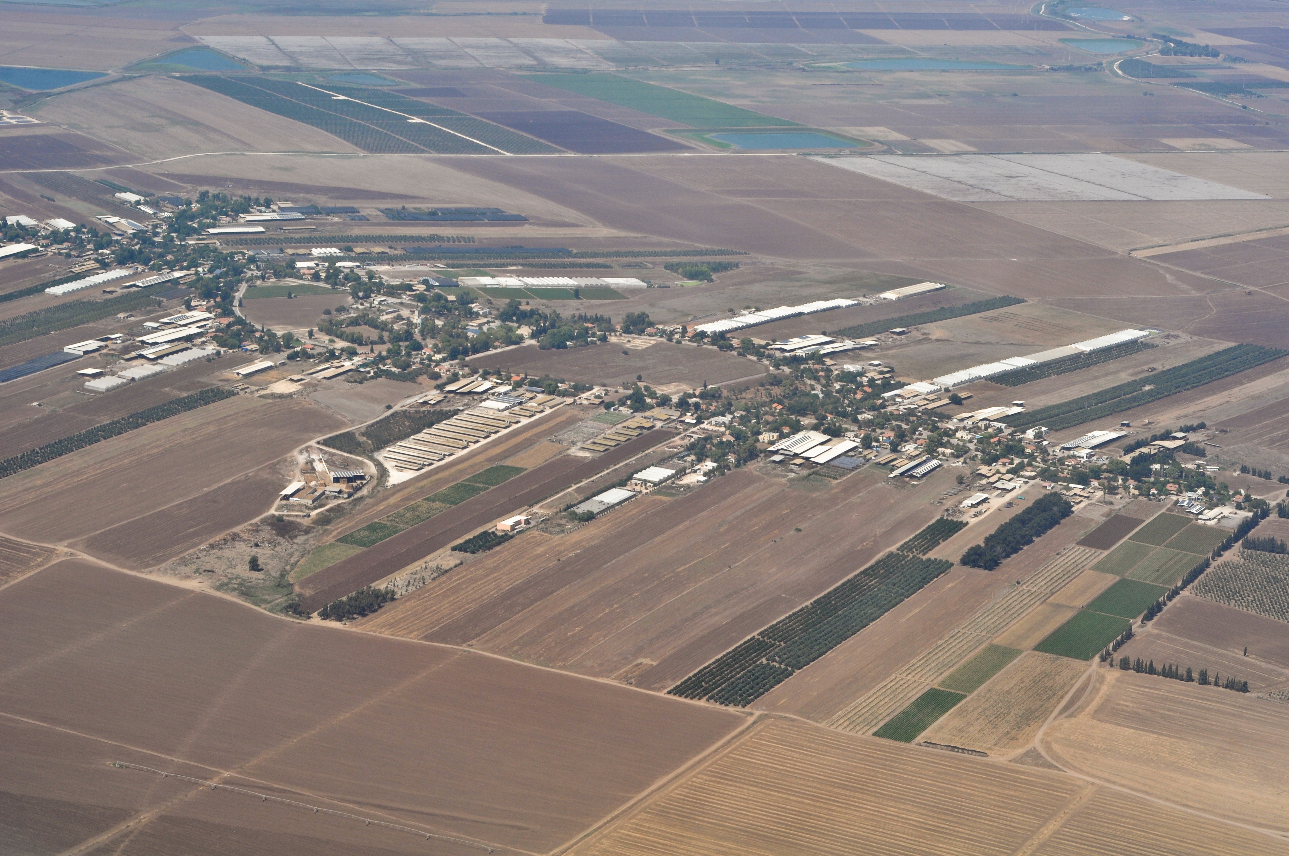 מושב היוגב